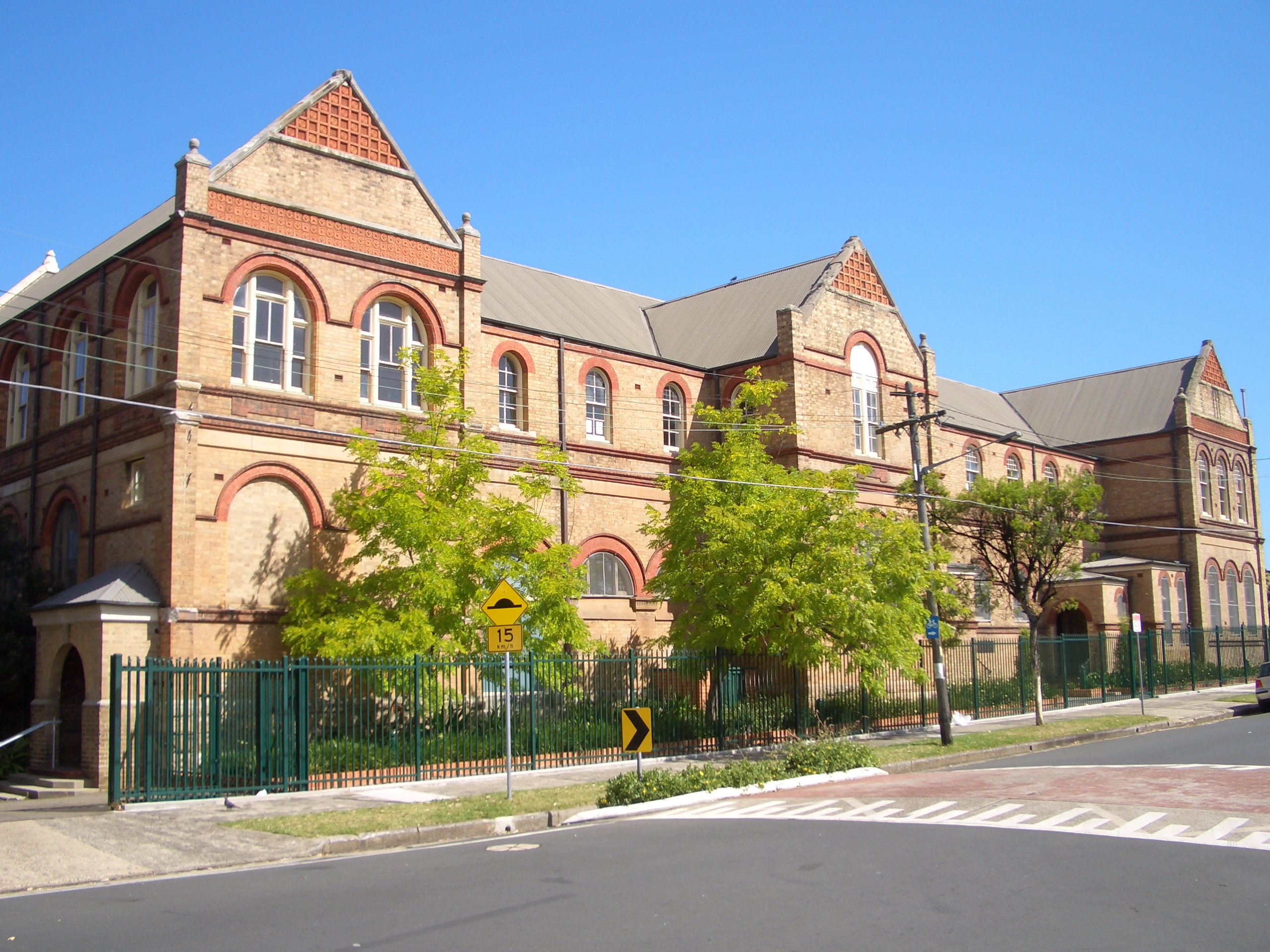 Dulwich Hill